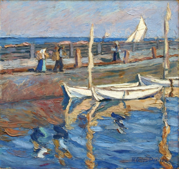 Schwedischer Fischerhafen (auch: „An der Mole“), Arild auf Kullen; Öl auf Leinwand; 80 x 85 cm; Privatbesitz